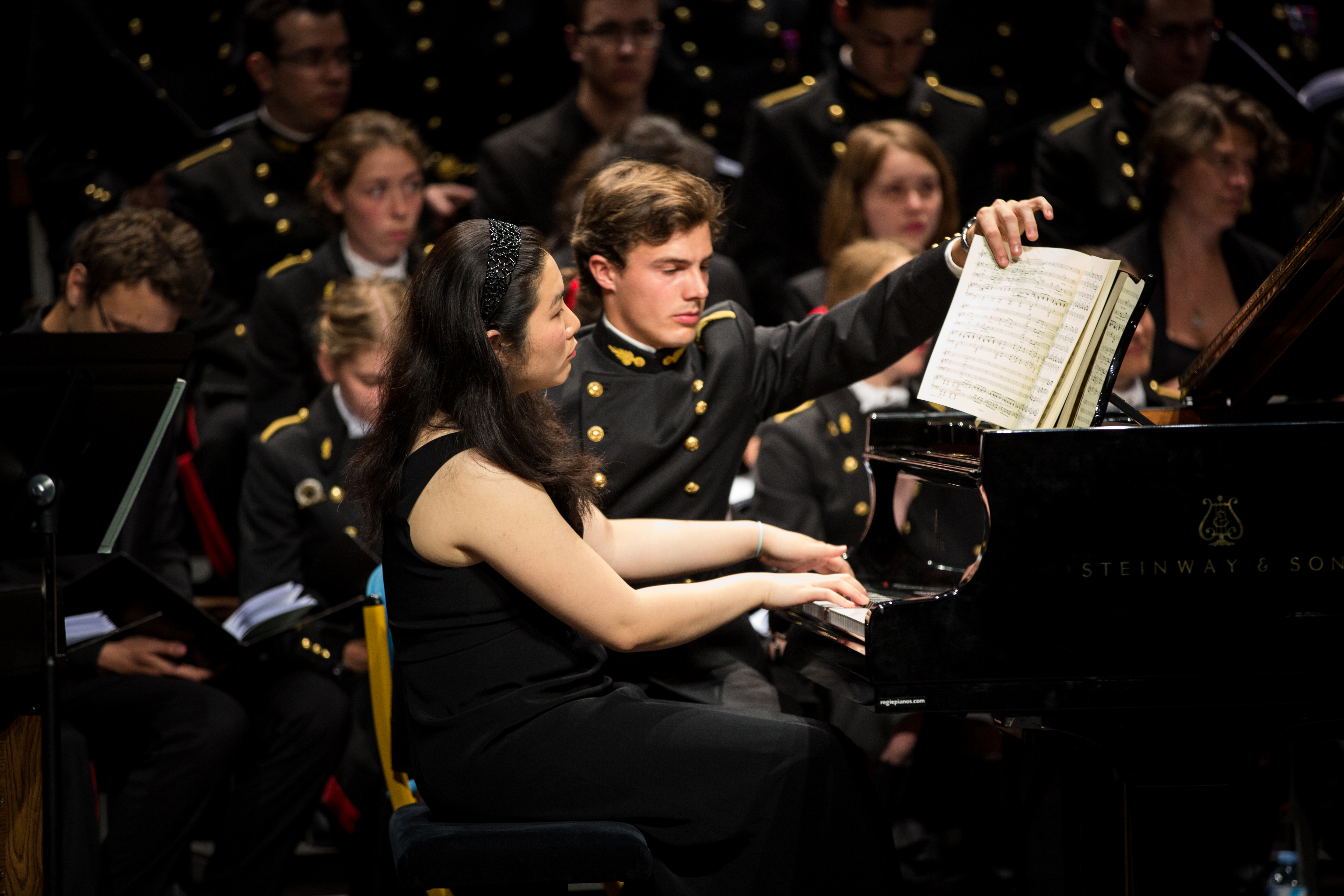 Concert de l’ensemble vocal de l’École polytechnique « ROSSINI : Petite messe solennelle » - Amphithéâtre Poincaré Crédit photographique : © École polytechnique - J.Barande